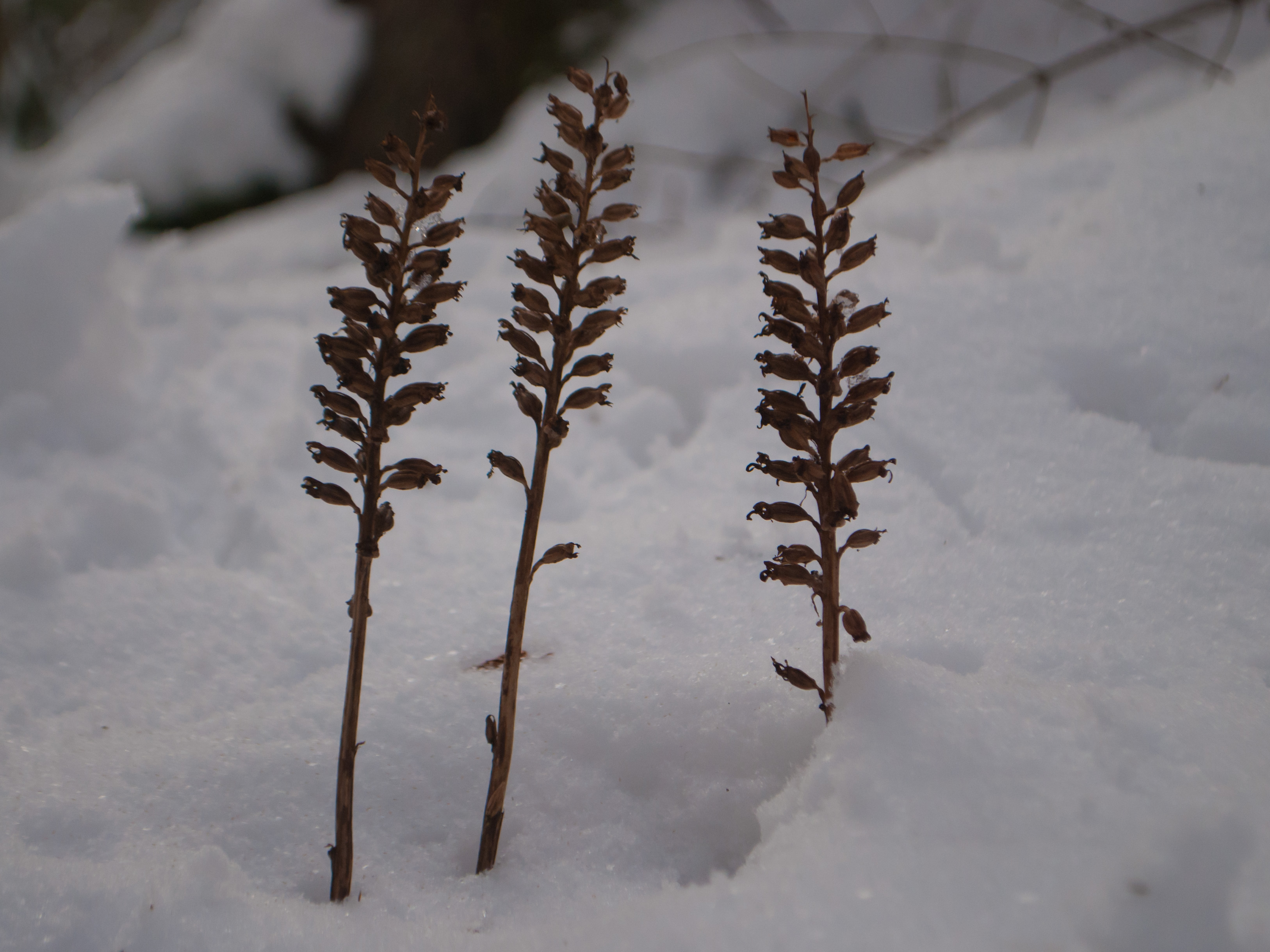 Гніздівка звичайна (Neottia nidus-avis) з родини Орхідних. Мармароський масив Карпатського біосферного заповідника.